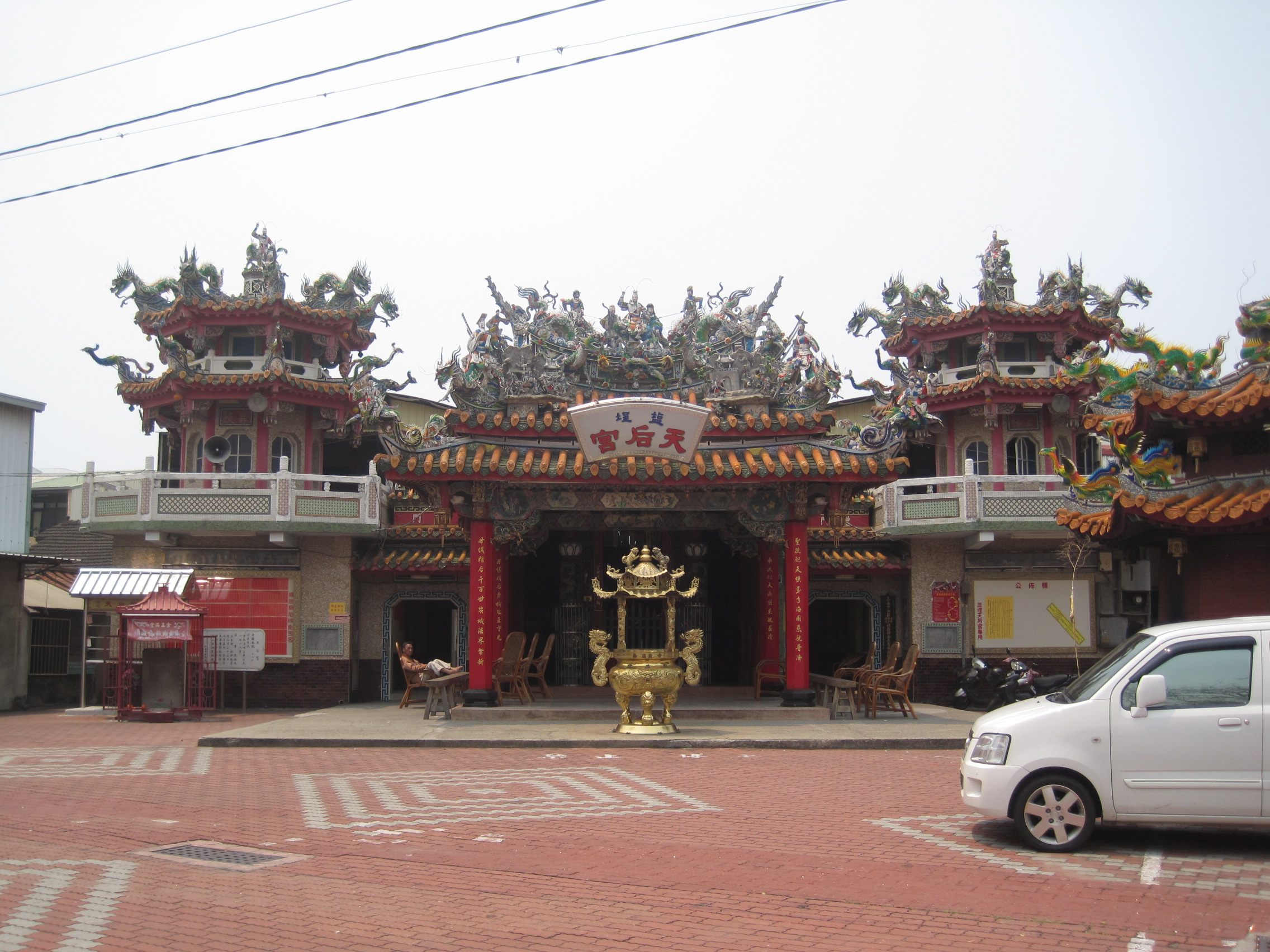 臺南鹽埕天后宮